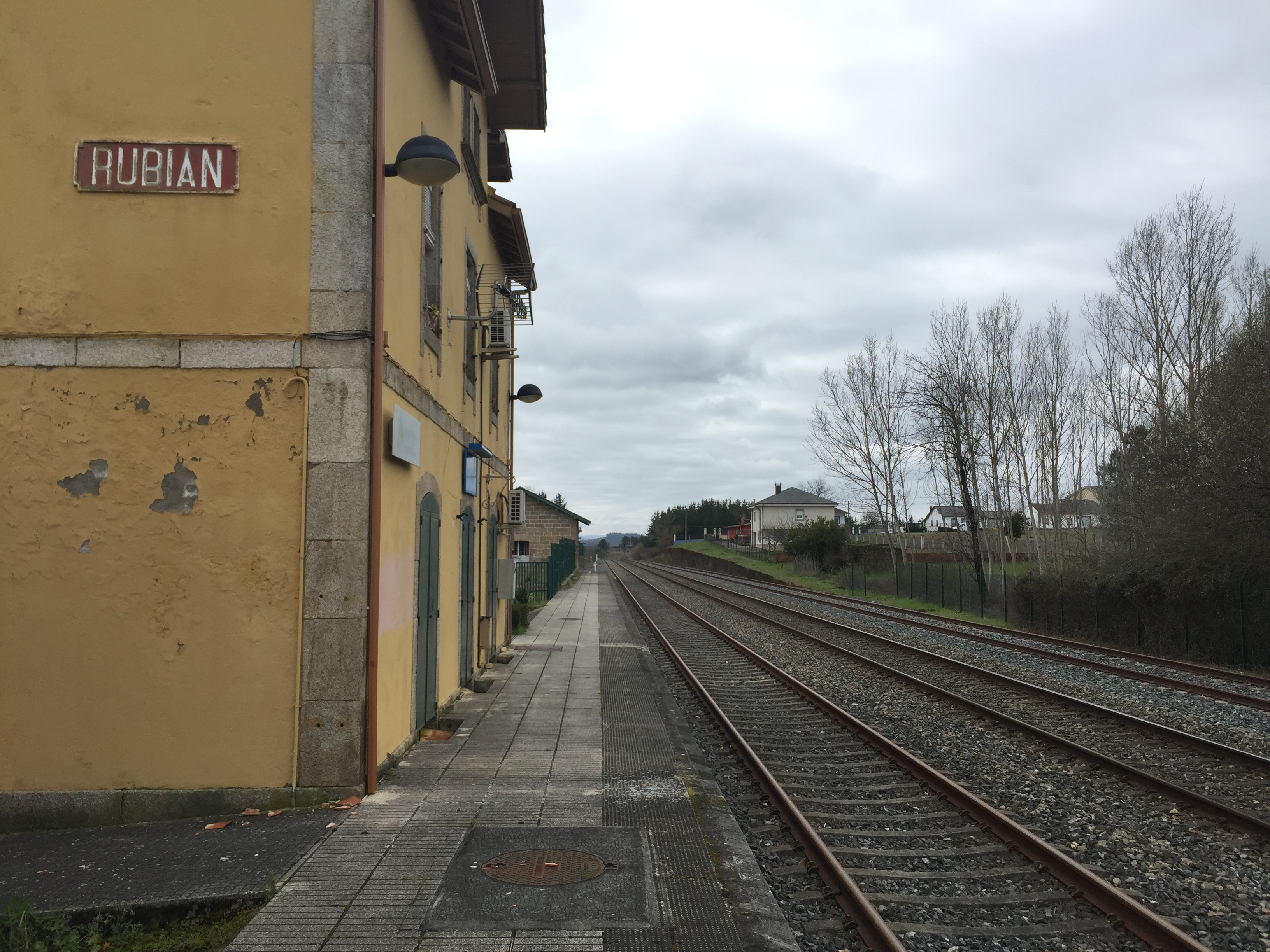 Estación ferroviaria de Rubián, en el municipio de Bóveda, provincia de Lugo, España.